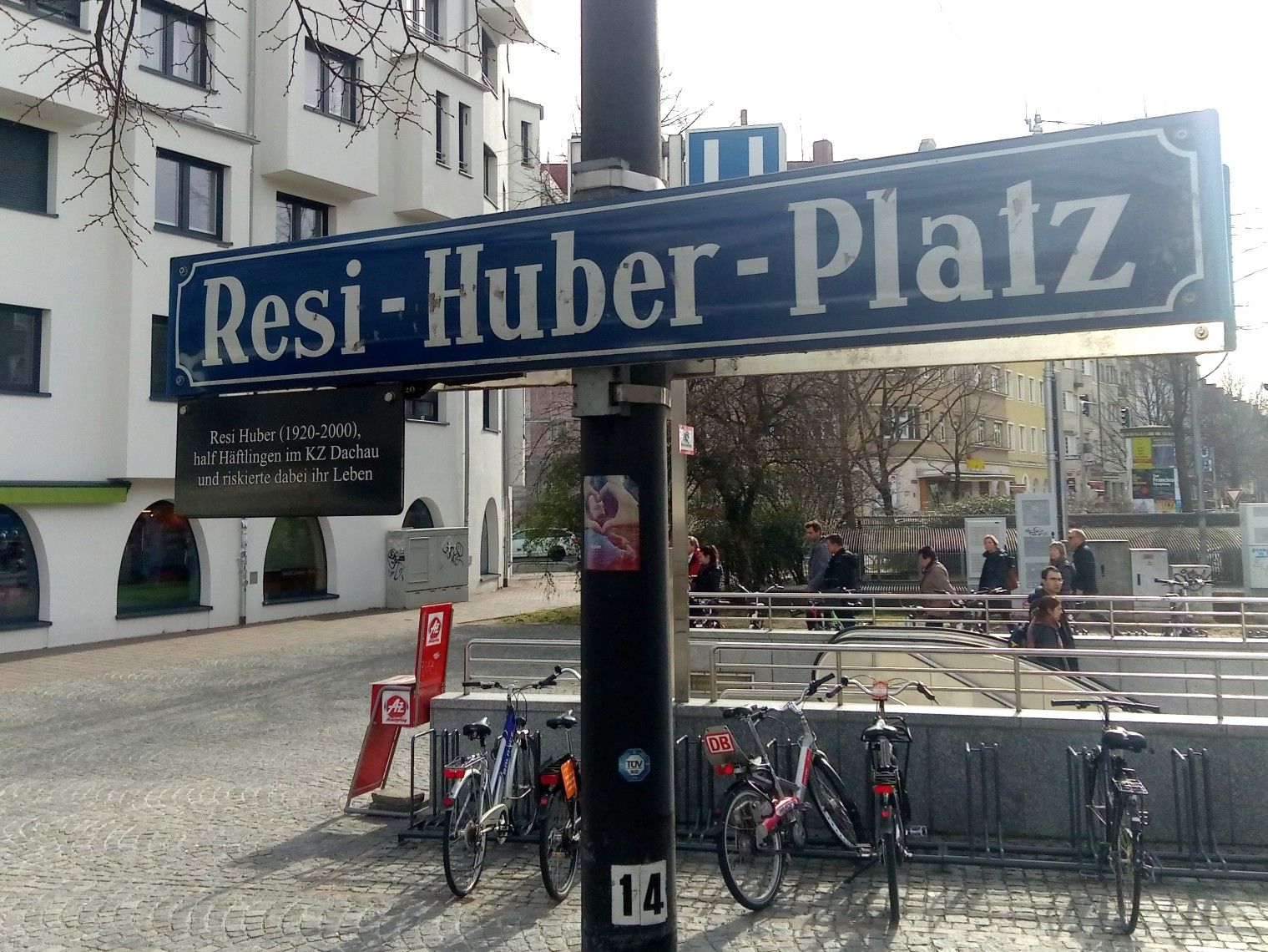 Straßenschild mit Infotafel über Resi Huber am gleichnamigen Platz.